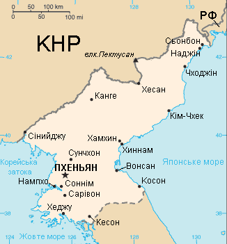 Мапа Південної Кореї